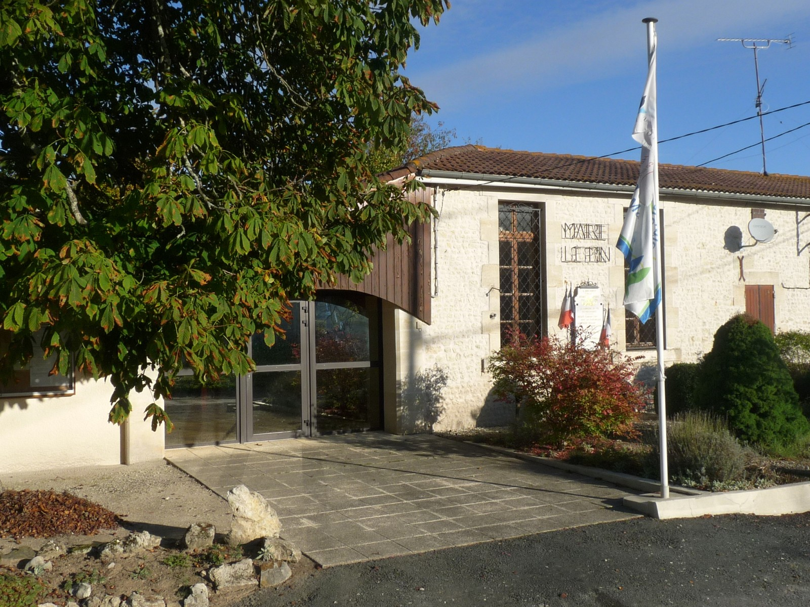 Mairie du Pin, Charente-Maritime, France